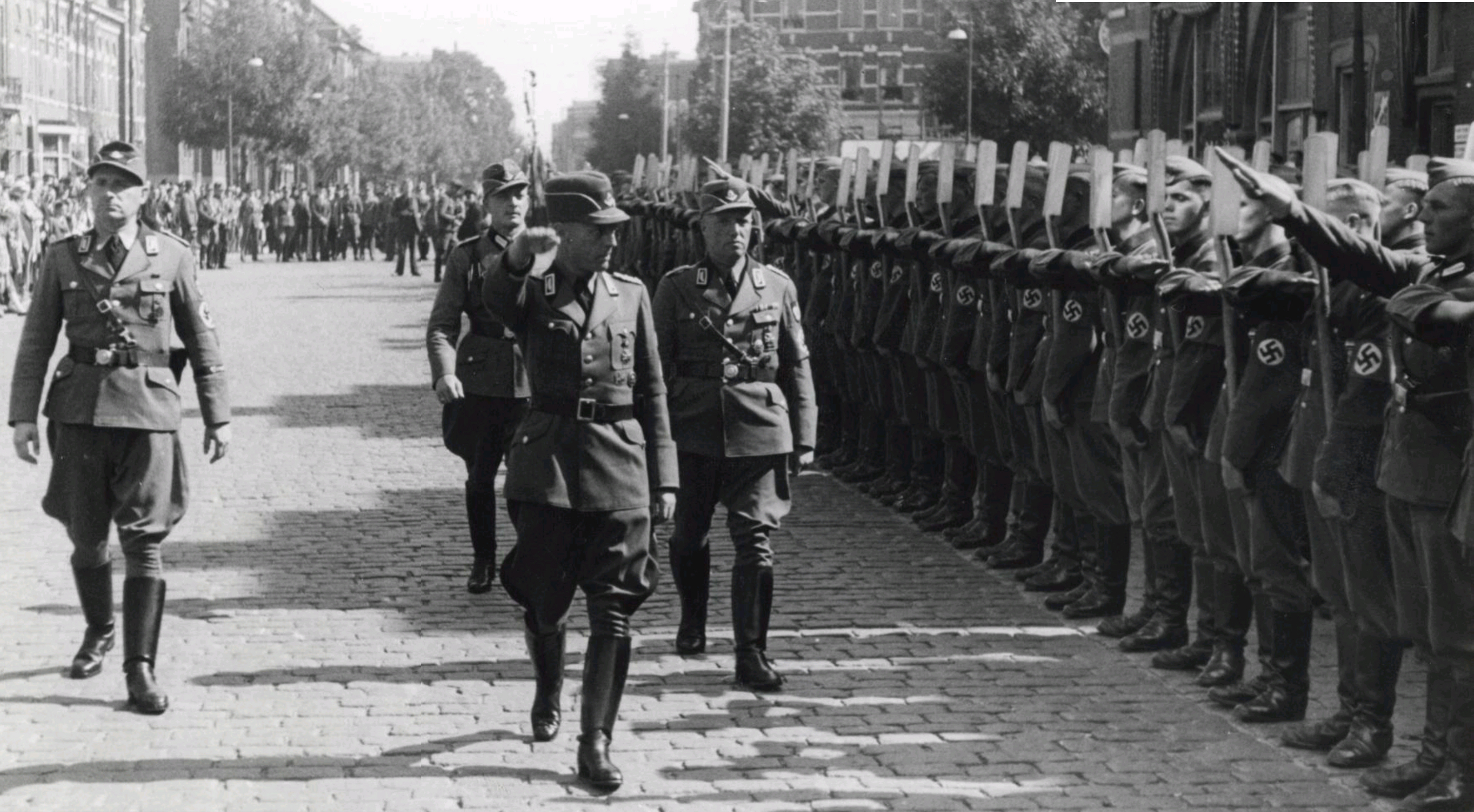 Tweede Wereldoorlog, Troepeninspectie. Generaal-arbeidsleider zur Loye inspecteerd de troepen van de arbeidsdienst te Amsterdam, Nederland 1940.